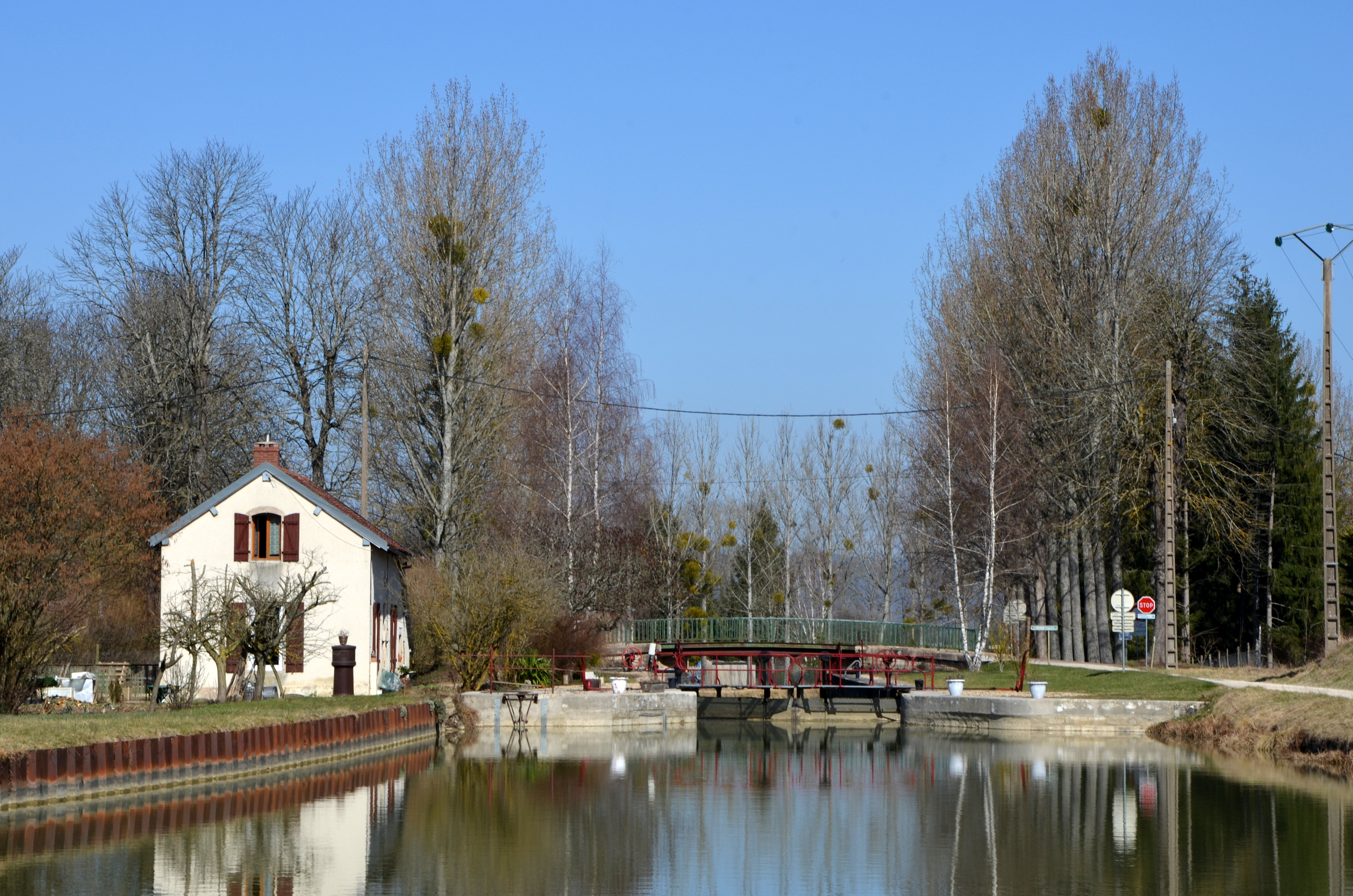 Canal de Bourgogne : Ecluse a Marigny le Cahouët , Bourgogne, France